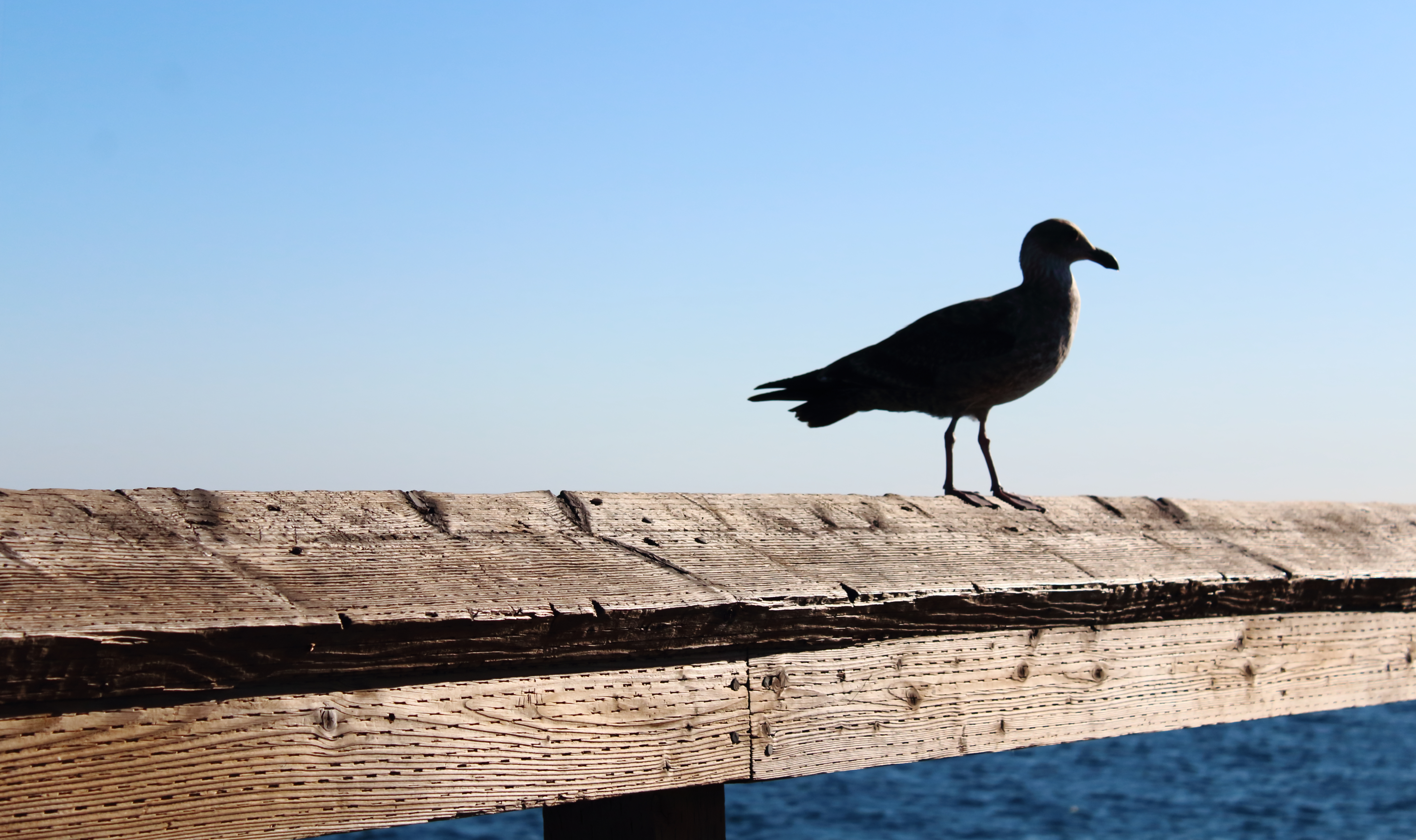 Sombra de ave en playa de Newport, California, Estados Unidos.